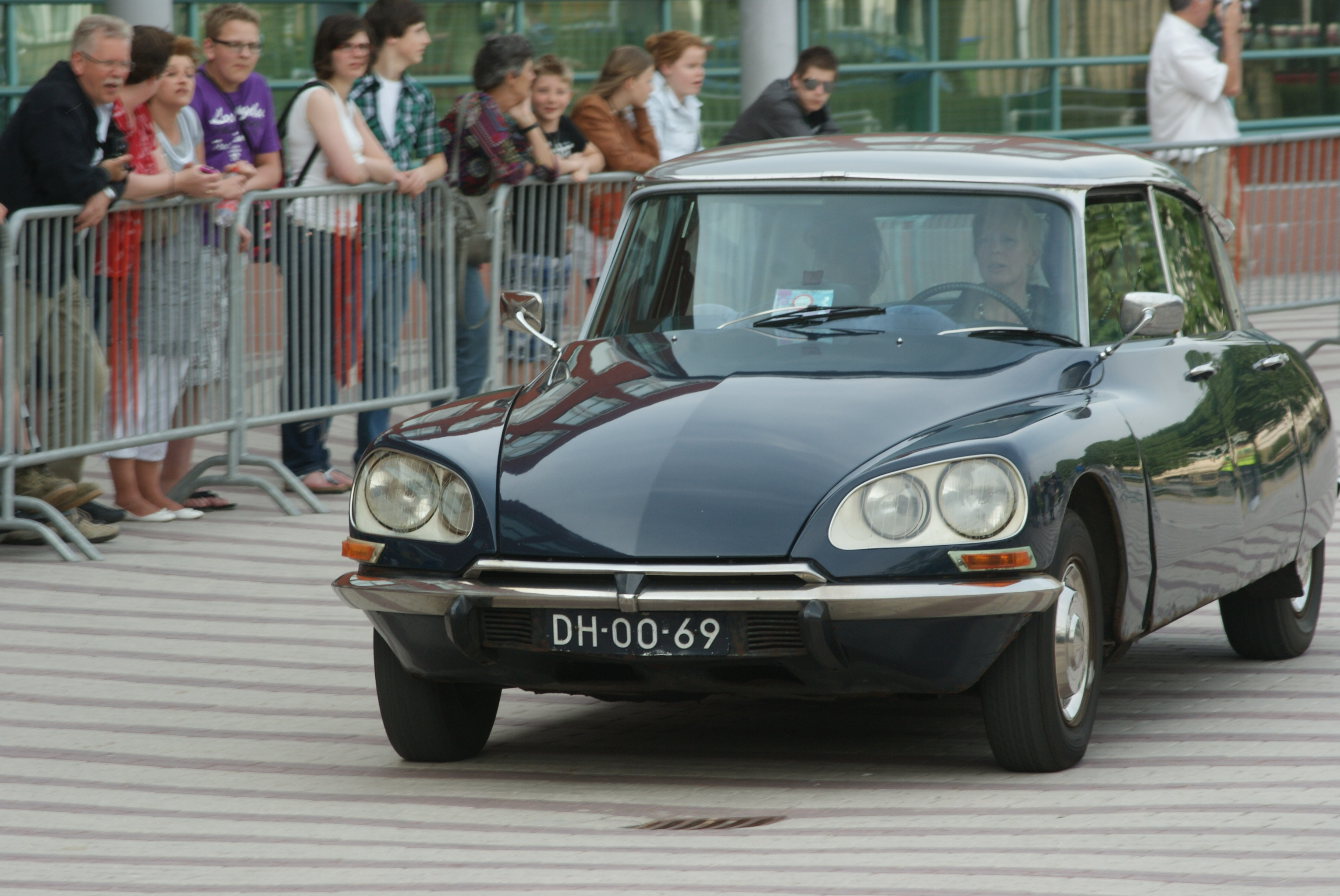 DH-00-69 Exam Prom, Ichthus College